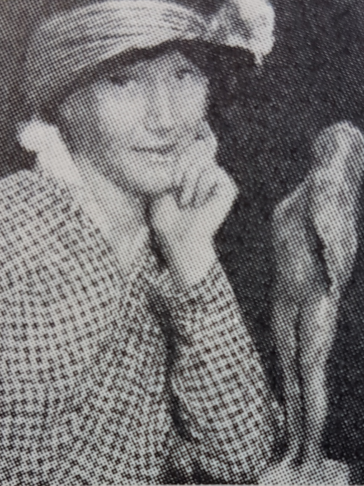 Ester Henning, avfotograferad porträttbild från Allhems Svenskt konstnärslexikon.